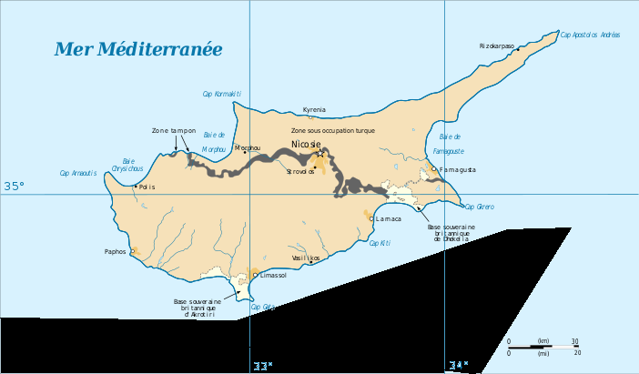 Erdöl- und Erdgasfelder in den Hoheitsgewässern der Republik Zypern.